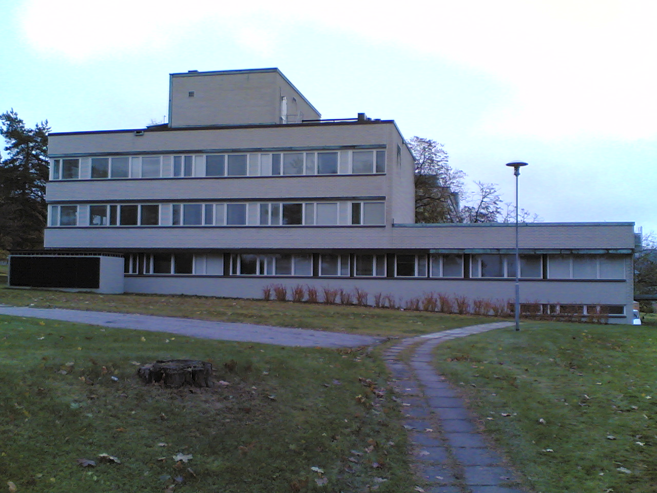 Kanslerinkaari